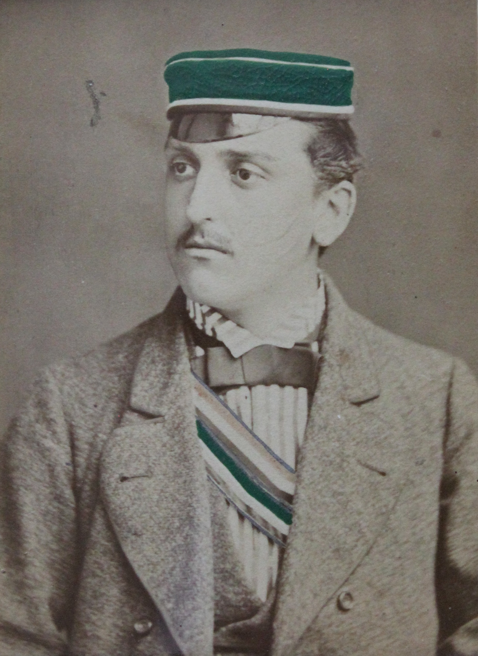 Porträtfotografie des späteren Konsularbeamten Wilhelm Knappe (1855–1910).